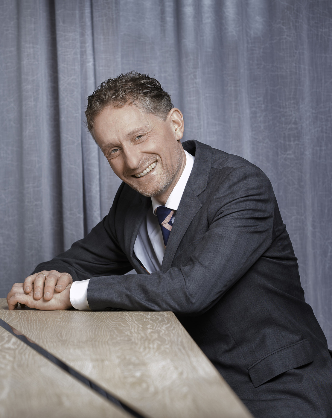 Foto: Morten Brakestad